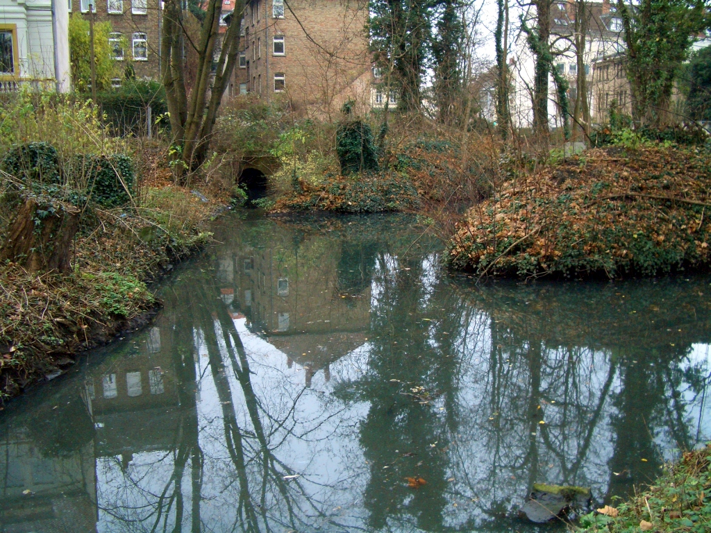 Zusammenfluss der Braunschweiger Stadtgräben Höhe Inselwall/Schuberstraße, Blick vom Inselwall. Geradeaus Austritt des Wendenmühlengrabens, rechts der Bosselgraben und schräg rechts der ehemalige Burgmühlengraben.